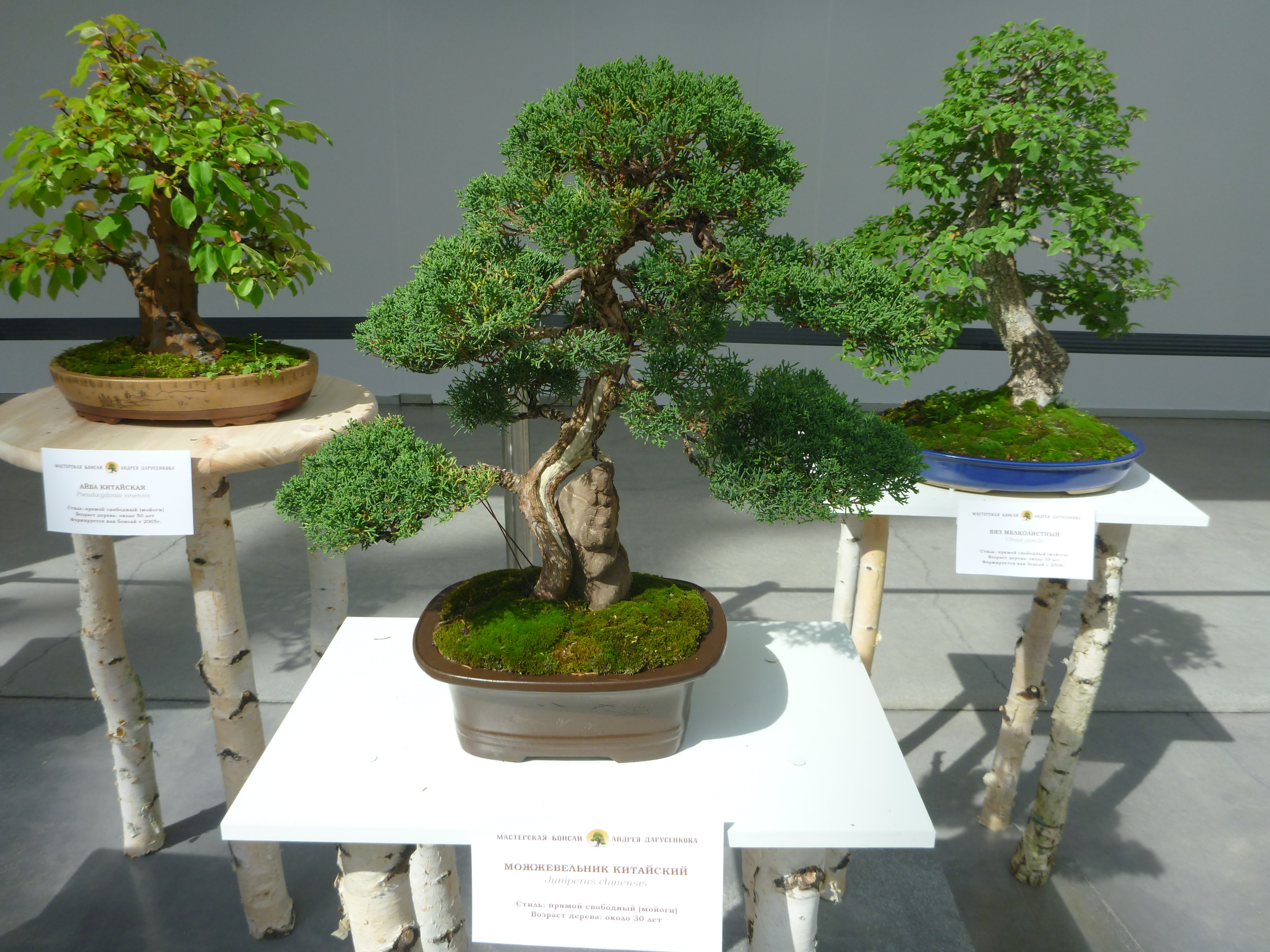 Можжевельник китайский бонсай в Ельцин-центре 2019 год